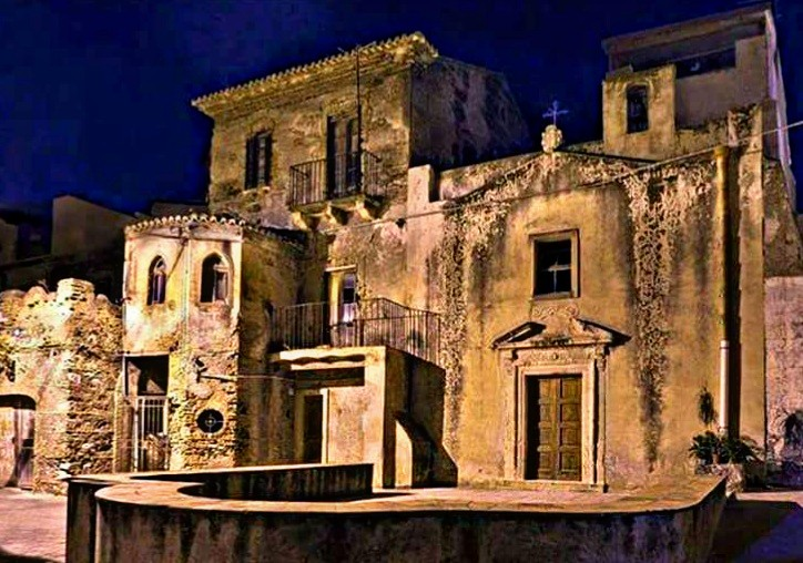 chiesetta del Santissimo crocifisso.